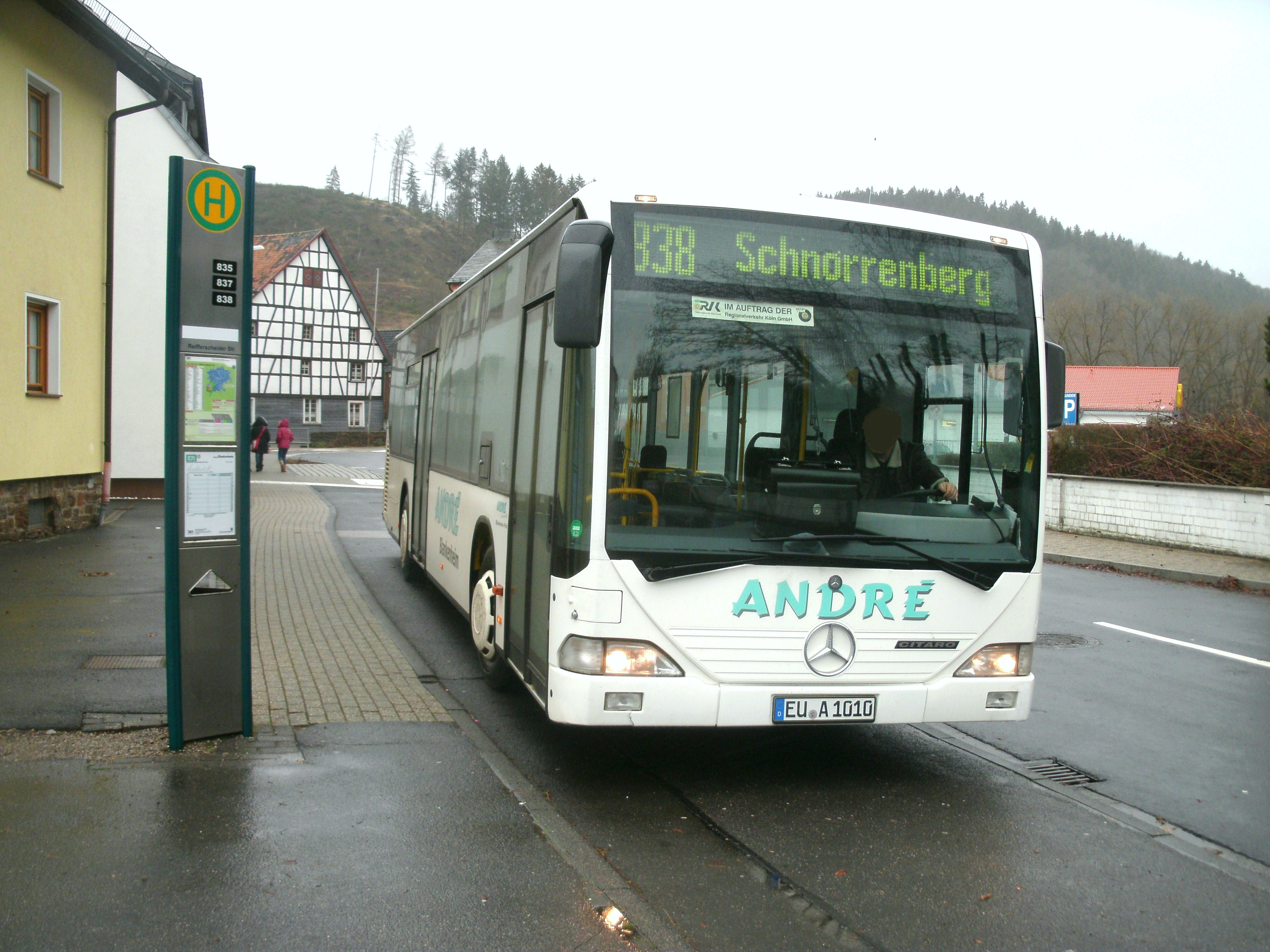 Linienbus von André Bustouristik (Betriebshof Blankenheim (Ahr)) im Auftrag der Regionalverkehr Köln als Linie 838 von Hellenthal Busbf nach Schnorrenberg in Blumenthal